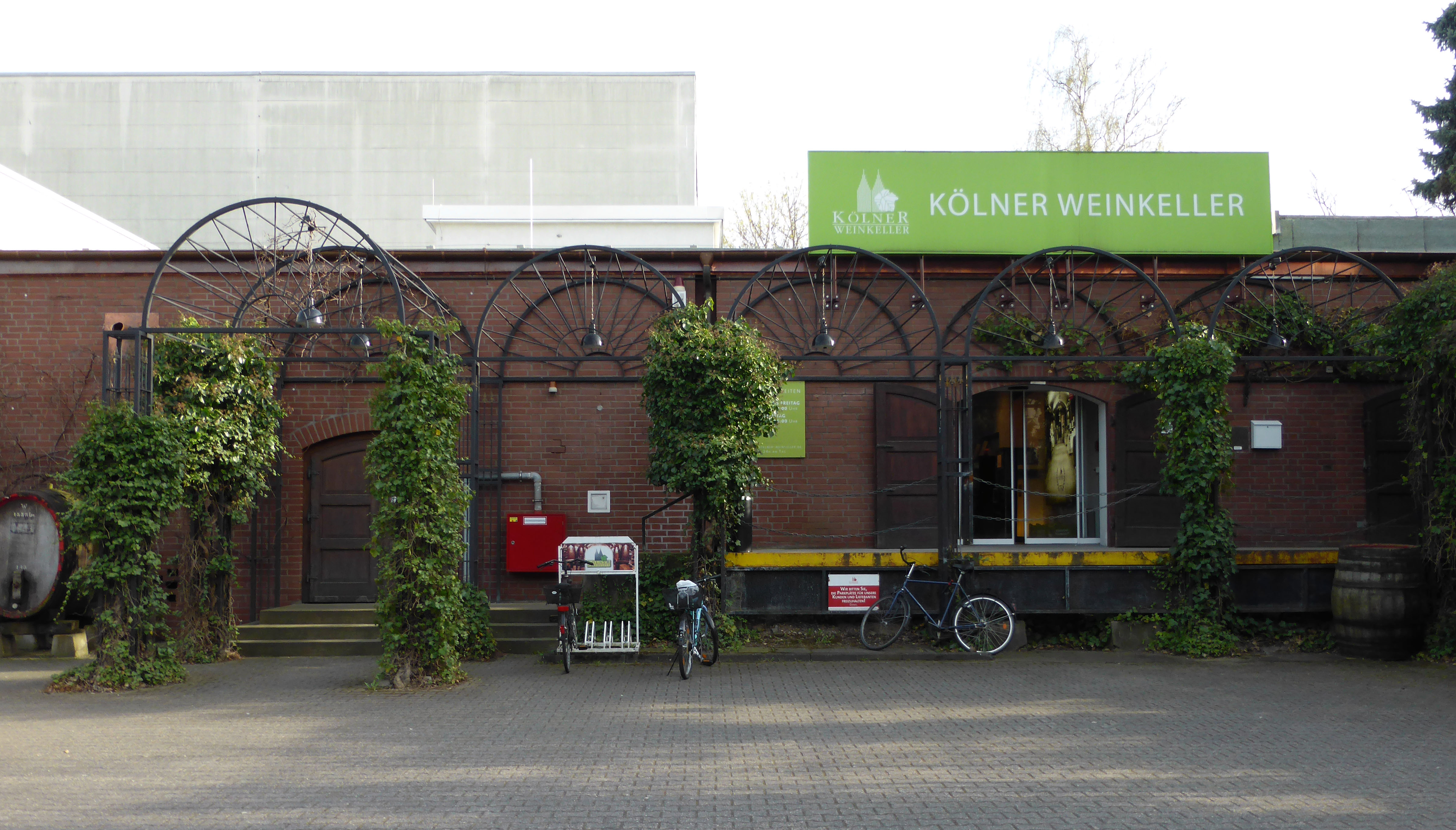 Kölner Weinkeller